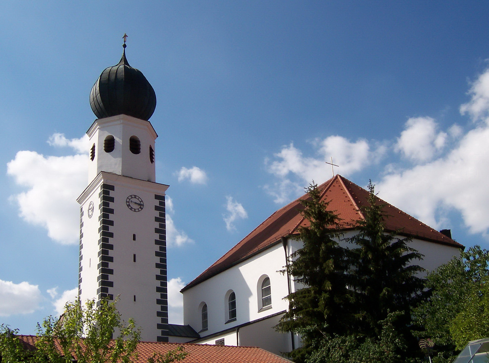 Essenbach, Mettenbach. Barocker Turm und alte Ausstattung der 1970 neuerbauten Katholische Pfarrkirche St. Dionysius.